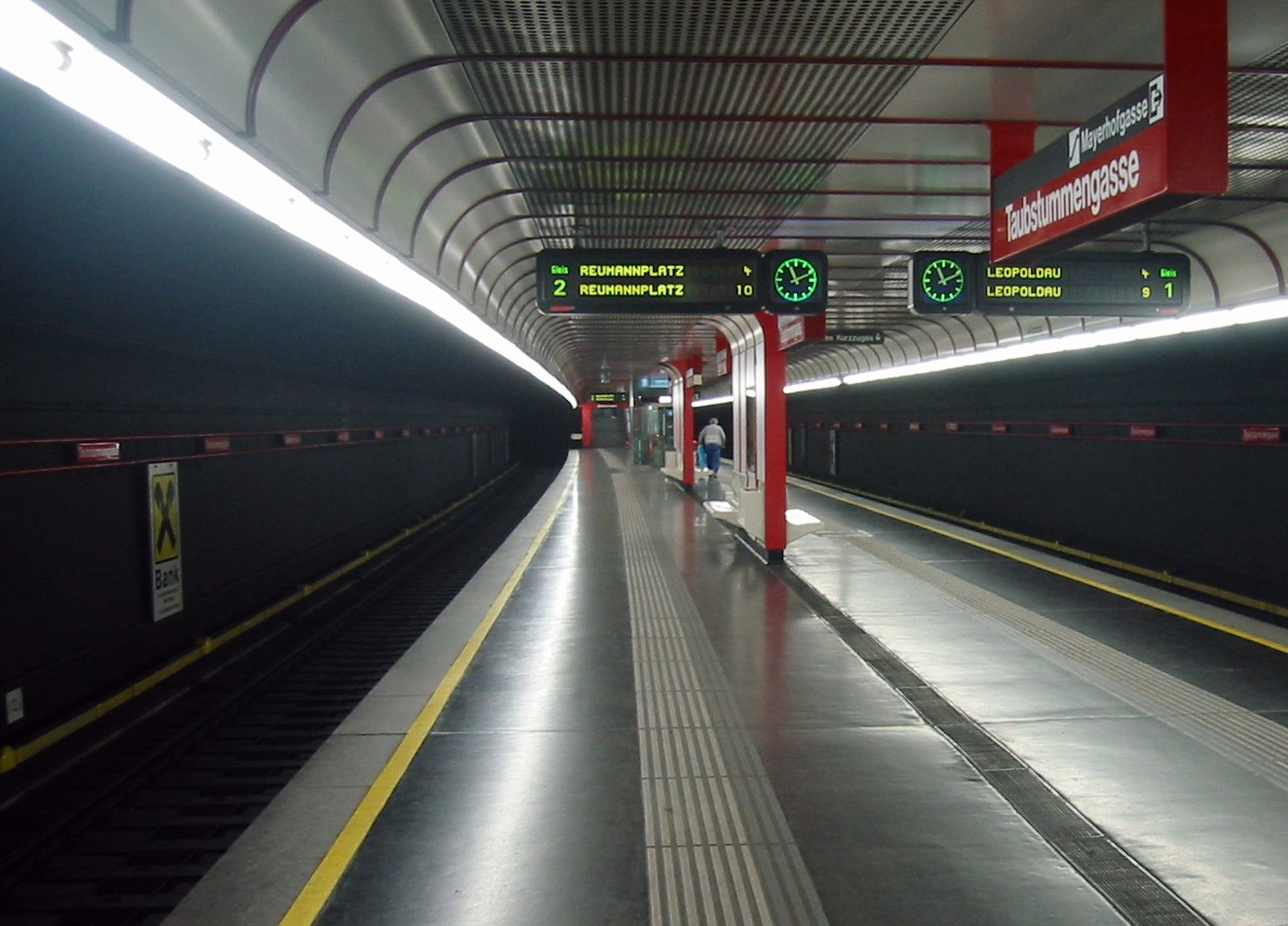 Wien, U-Bahn-Station Taubstummengasse, Bahnsteig